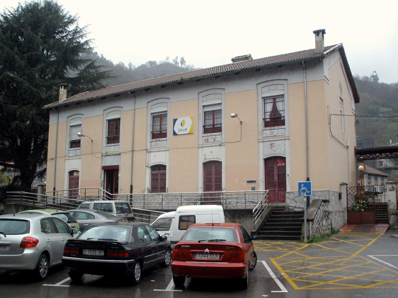 Sotrondio (San Martín del Rey Aurelio, Asturias) - Estación de FEVE